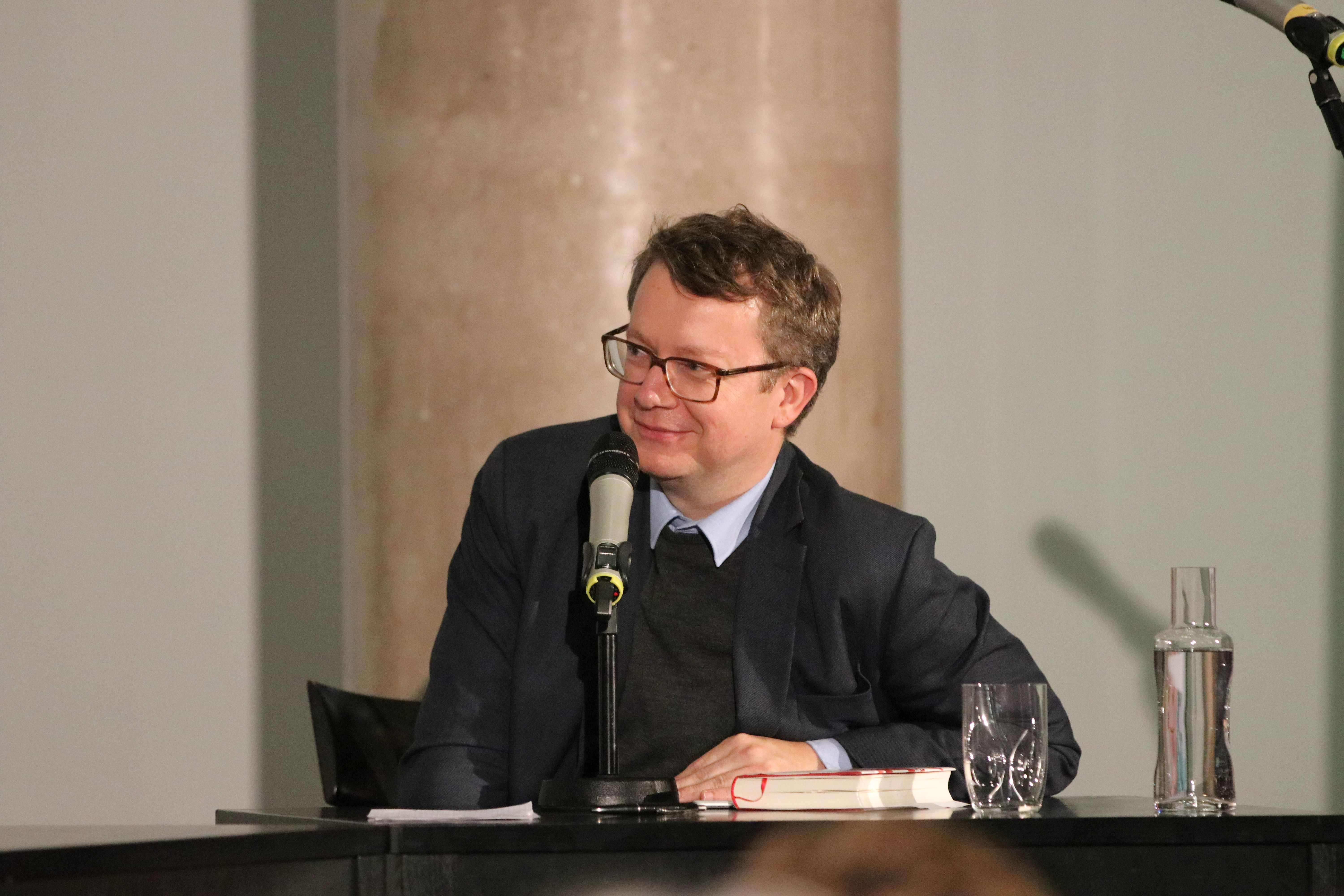 Der Schriftsteller und Journalist Adam Soboczynski auf dem forum:autoren des Literaturfests München 2017